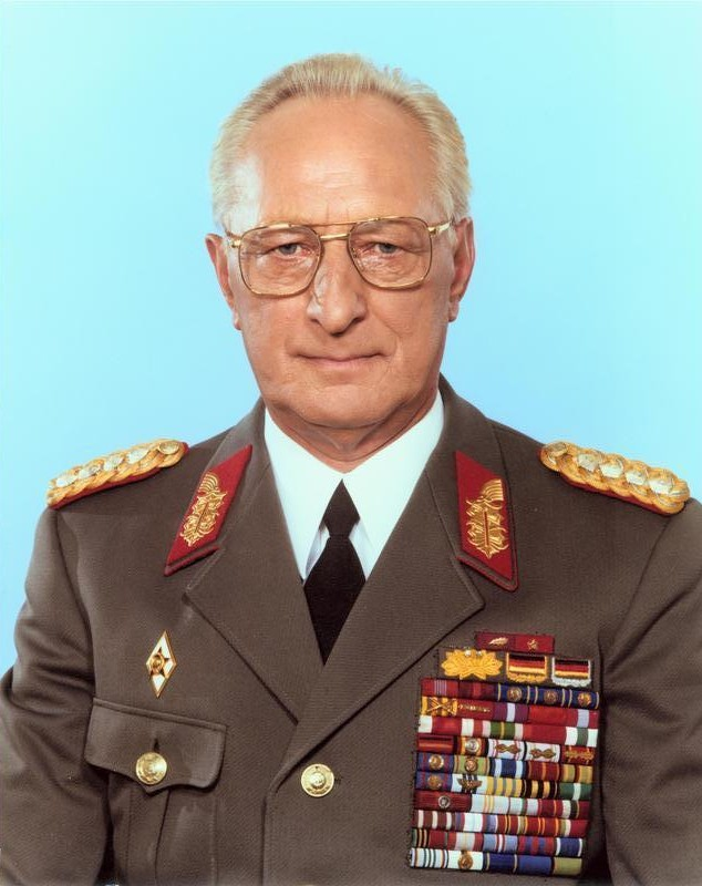 ADN-ZB/DEWAG/5.7.88/Berlin Armeegeneral Heinz Keßler, Minister für Nationale Verteidigung der DDR und Mitglied des Politbüros des ZK der SED